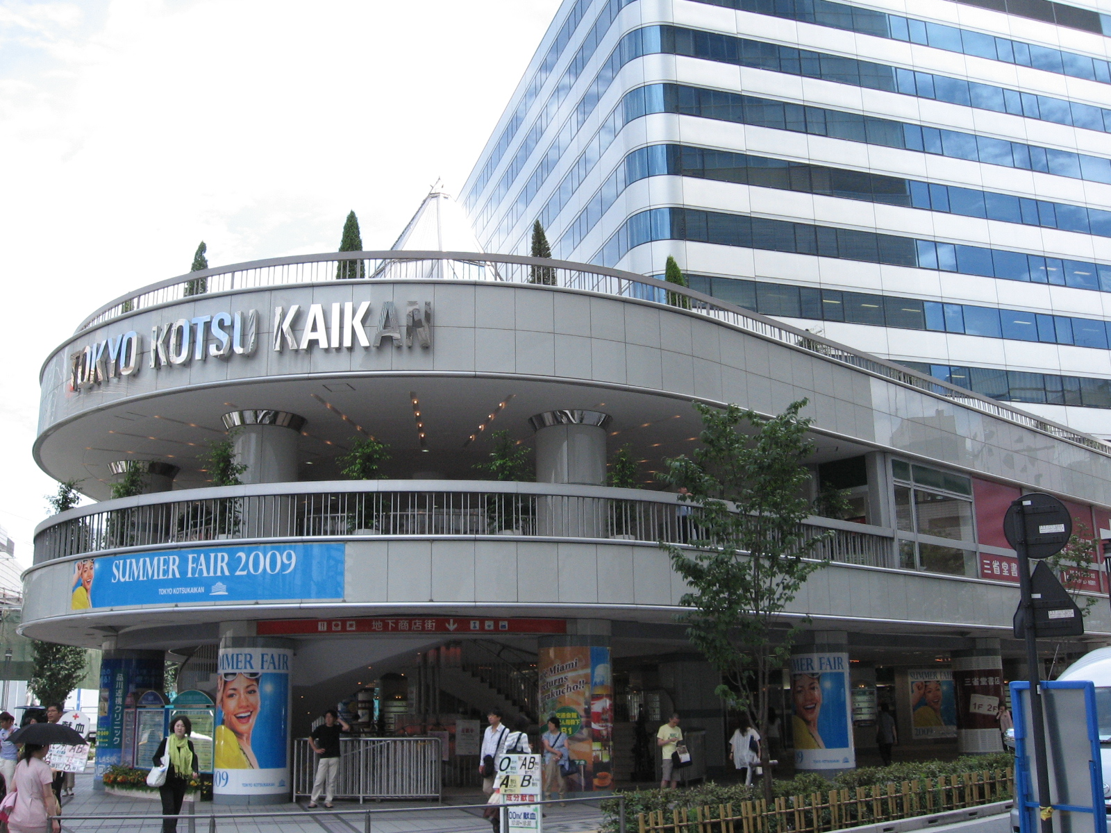 TOKYO KOTSU KAIKAN